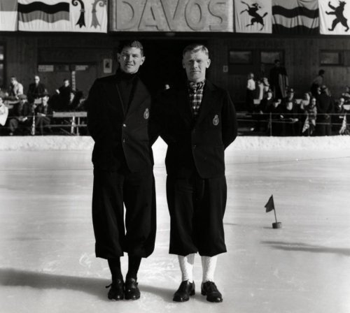 Jan Langendijk (rechts) en Roelof Koops (beiden in plus fours pakken) nemen in 1938 deel aan de wereldkampioenschappen schaatsen in Davos - Zwitserland.